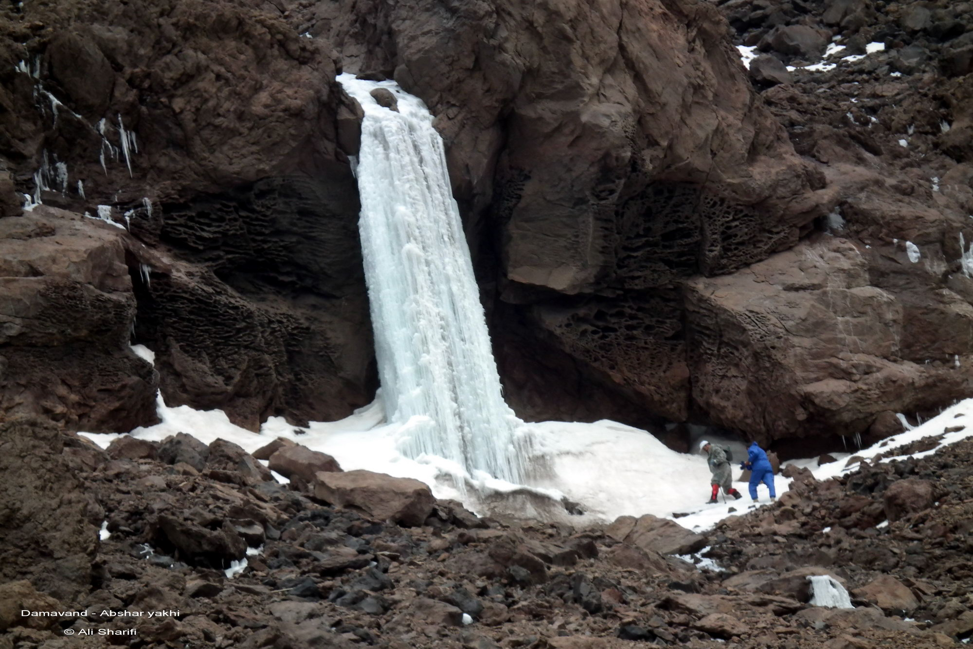 آبشار یخی در ارتفاع 5100 متری - جبهه ی جنوبی دماوند